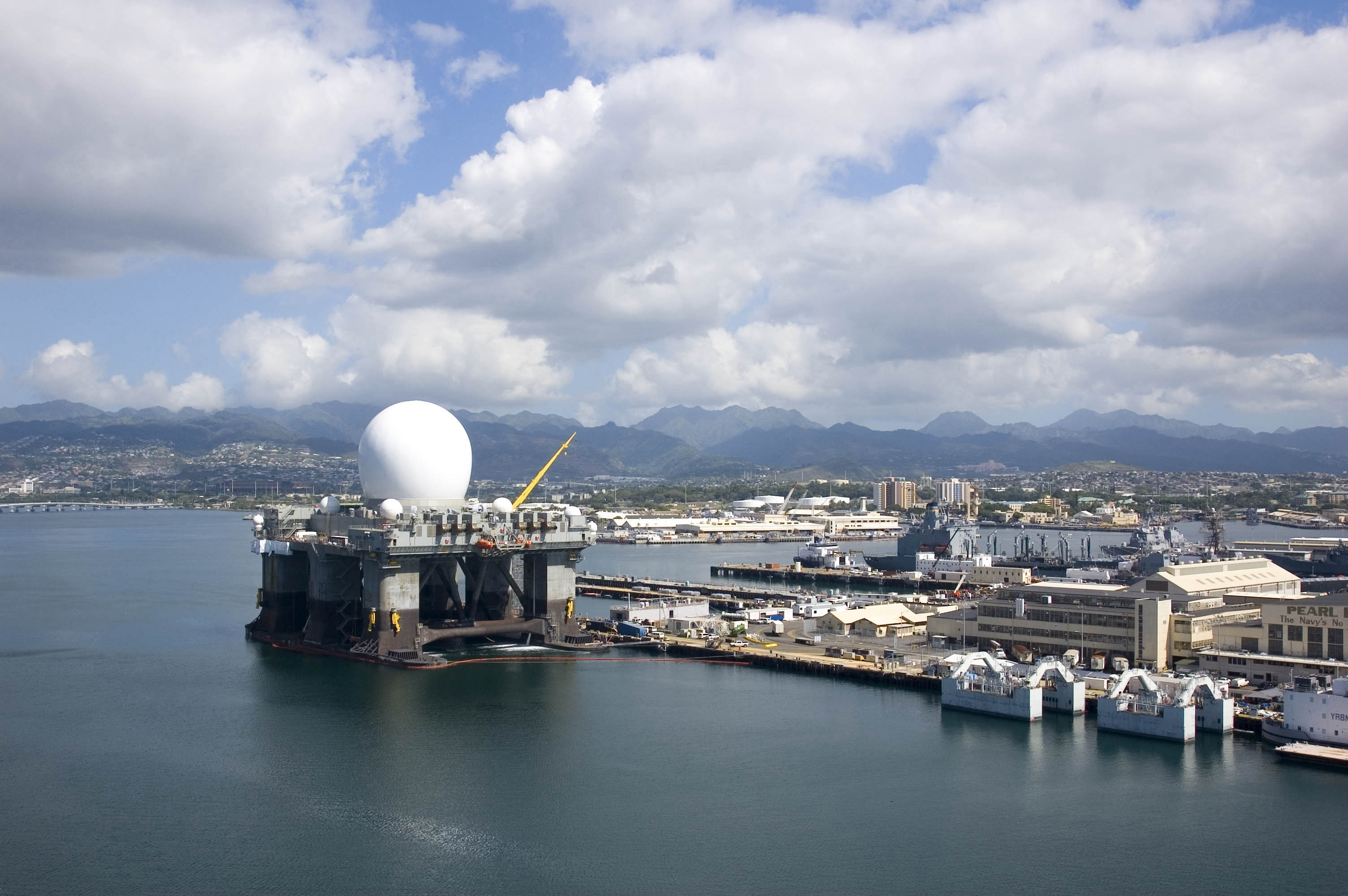 Das US-amerikanische Sea Based X-Band Radar (SBX) während der Fertigstellung im Hafen von Pearl Harbor, Hawaii, am 31. Januar 2006. Es ist das weltweit größte X-Band-Radar und ein wesentlicher Bestandteil des US-Raketenabwehrsystems. Stationiert wird das SBX ab 2007 auf Adak [1], eine der zu Alaska gehörenden Aleuten-Inseln.